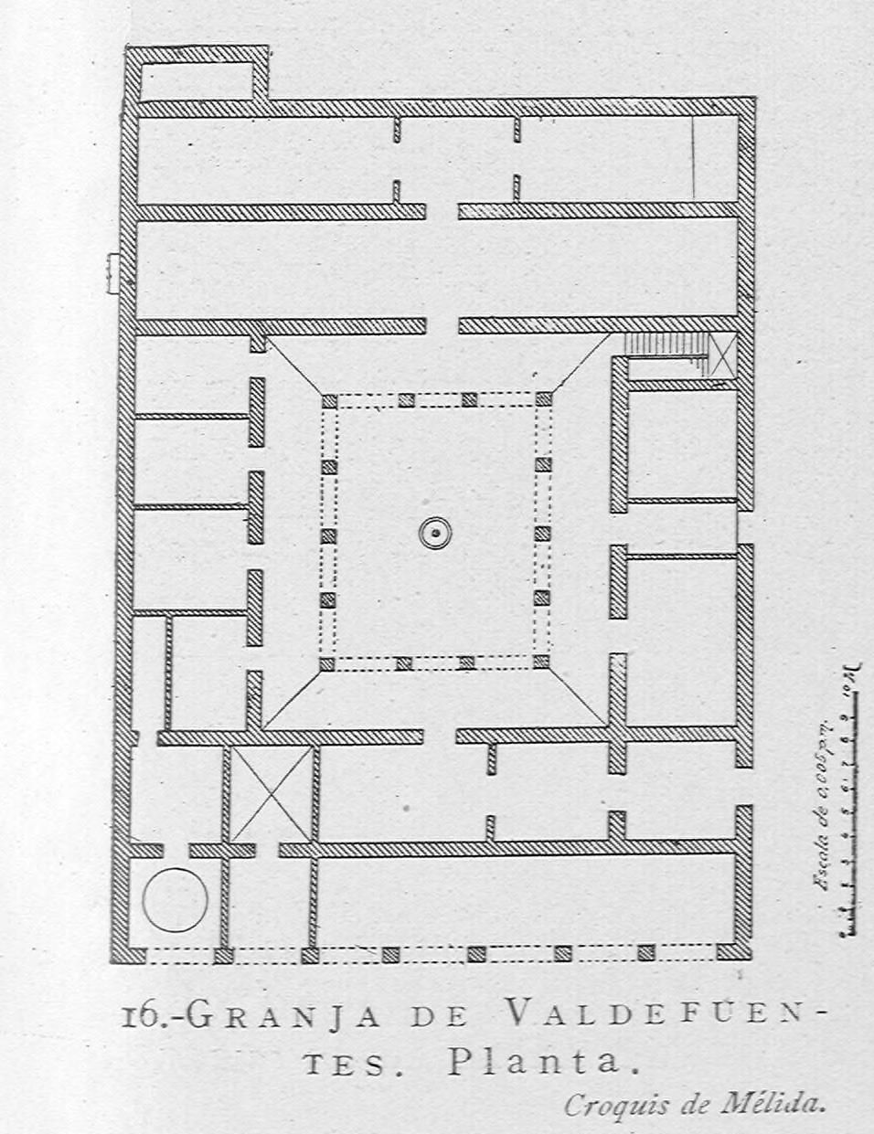 Arquitectura civil española de los siglos I al XVIII. Tomo primero. Arquitectura privada. Página 53.